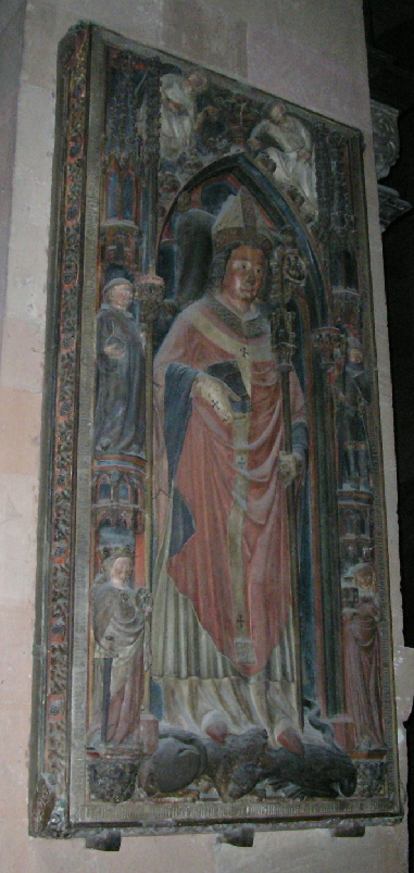 Bildmotiv: Grabdenkmal des Mainzer Erzbischofs Matthias von Bucheck; Quelle: Eigene Fotografie vom 03.01.05; Lizenz: GNU-FDL